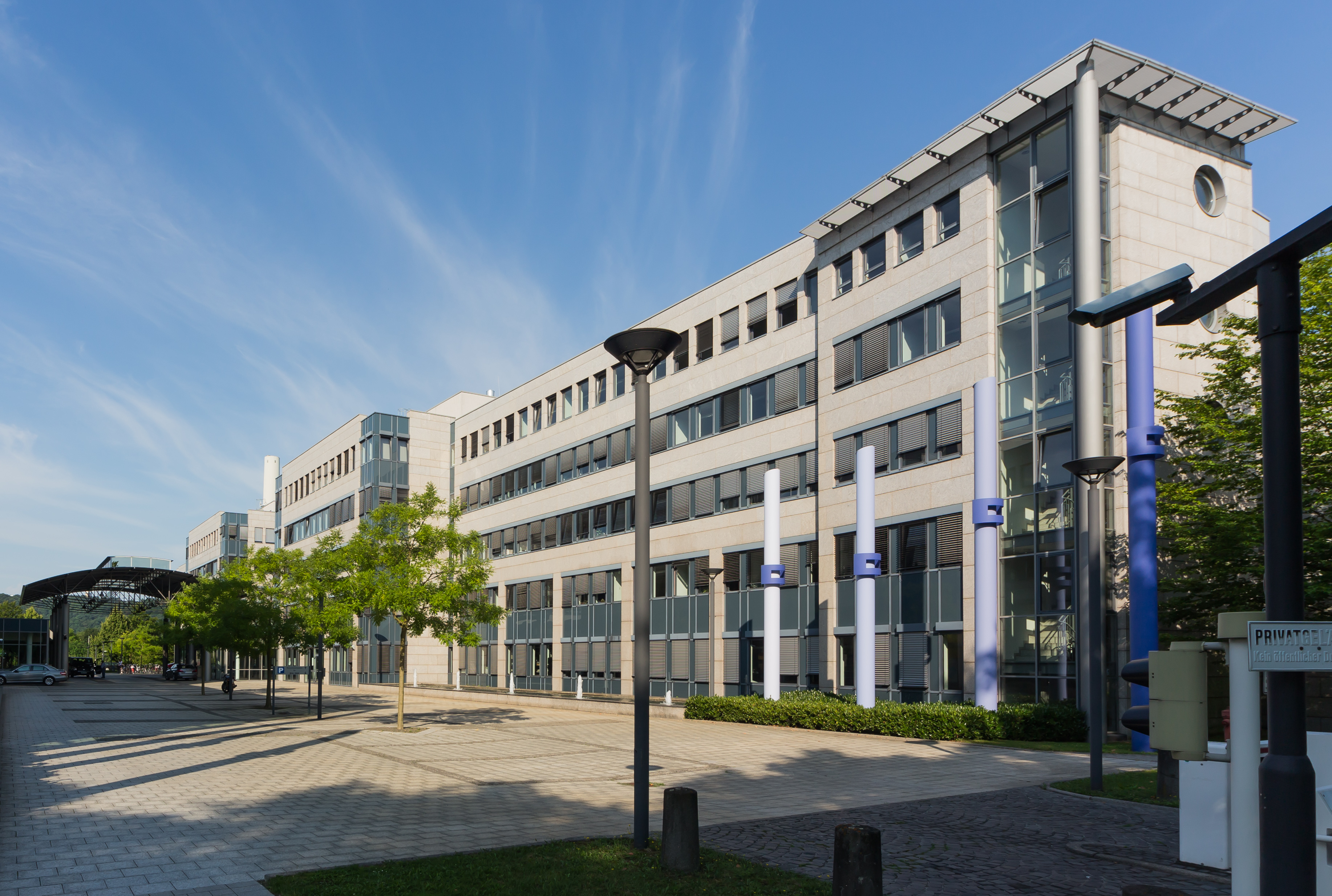 Friedrich-Ebert-Allee 38, Bonn-Gronau – Sitz des Bundesversicherungsamts und der Gemeinsamen Wissenschaftskonferenz